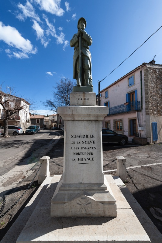 Monument aux morts - Archives départementales de l’Hérault - FRAD034-2458W-Saint-Bauzille-de-la-Sylve-00001